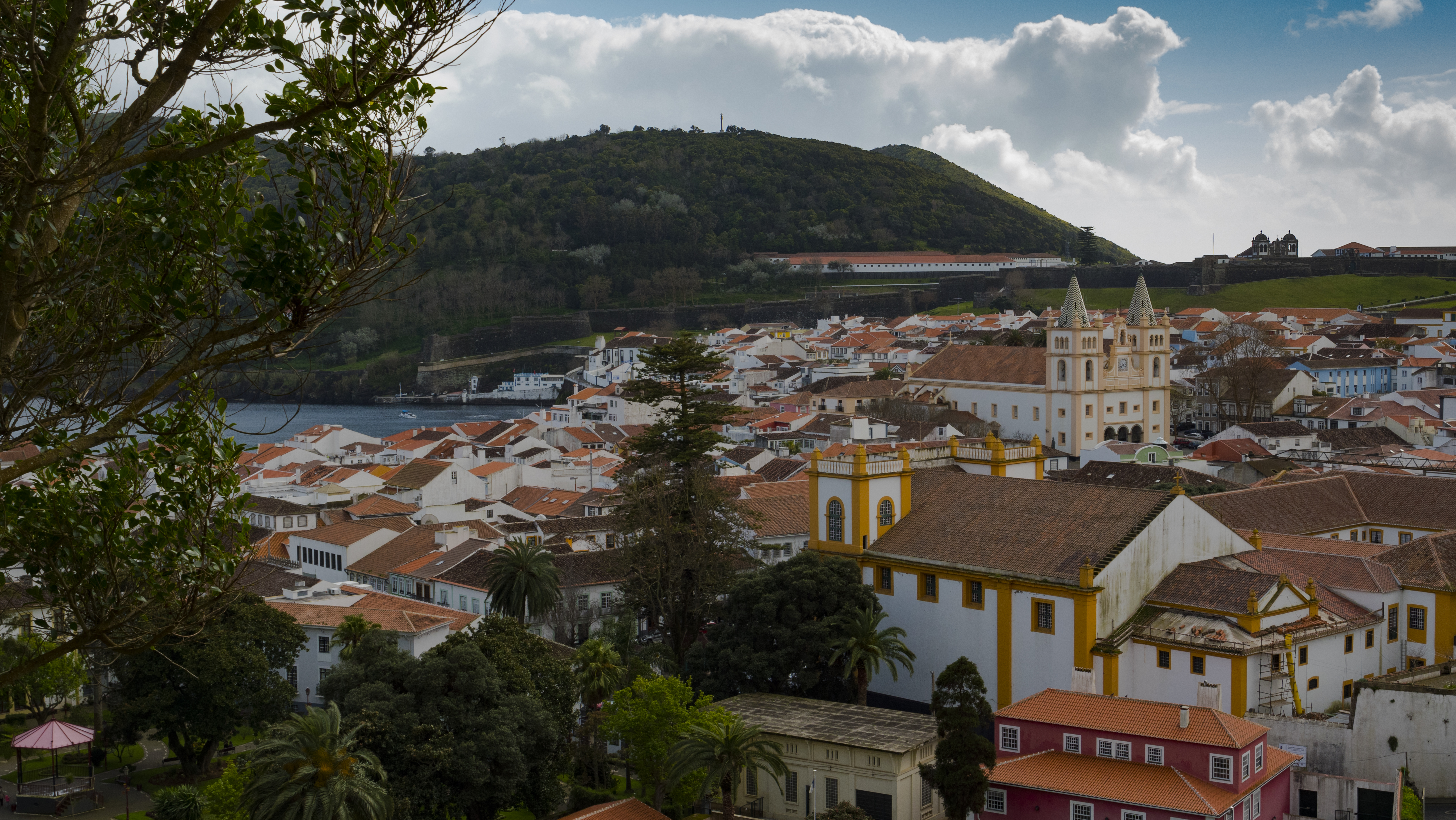 Angra do Heroísmo em Abril de 2018